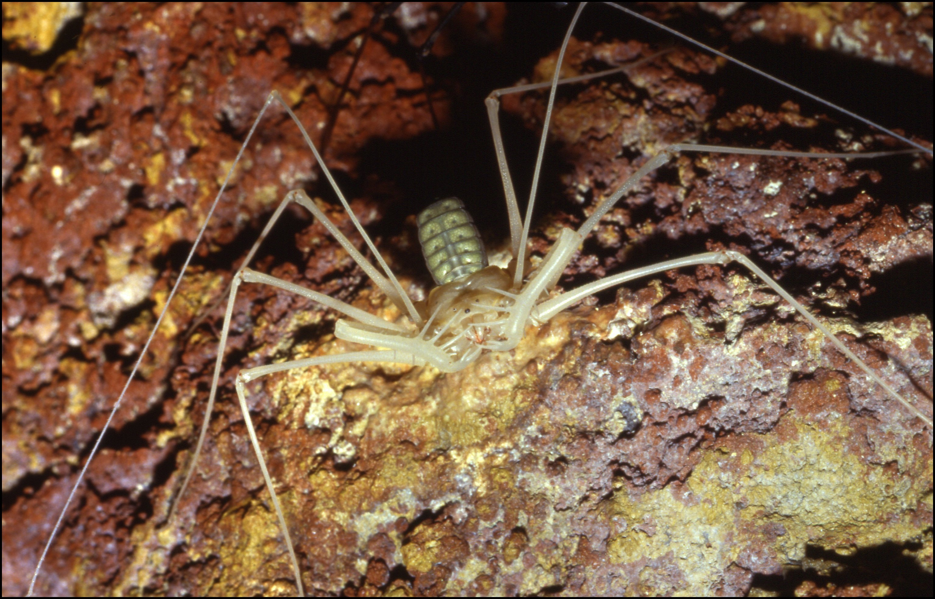 Heterophrynus longicornis venant de muer, grotte Fourgassié, Guyane. Détail.